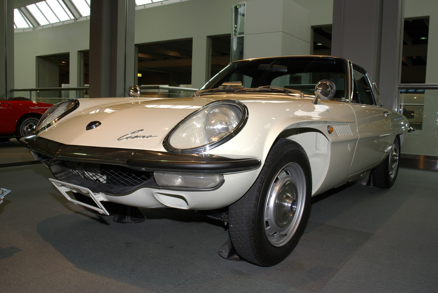 後期型コスモスポーツ斜め前方より